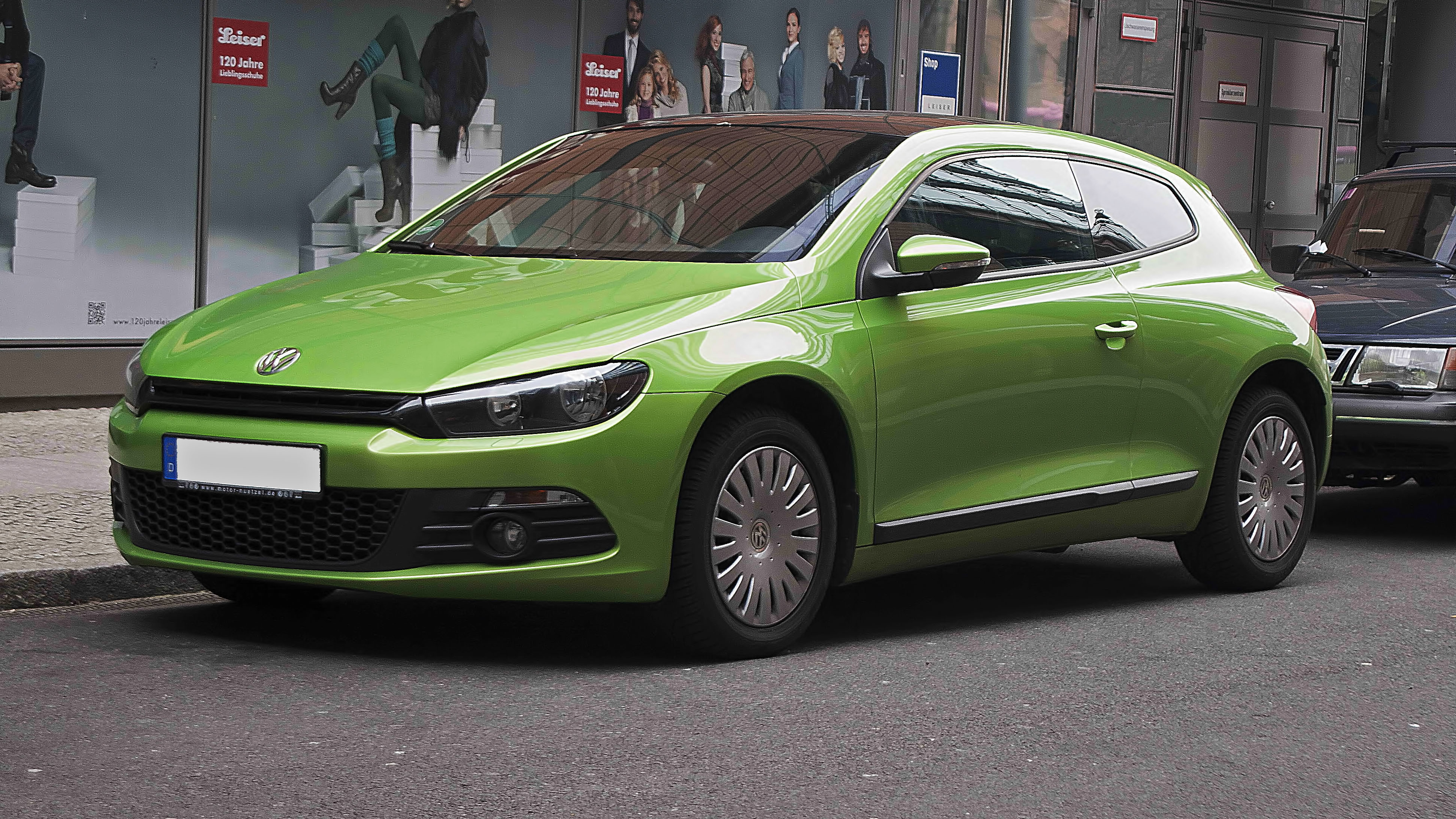 Viperngrüner Scirocco III in Berlin-Mitte Frontansicht